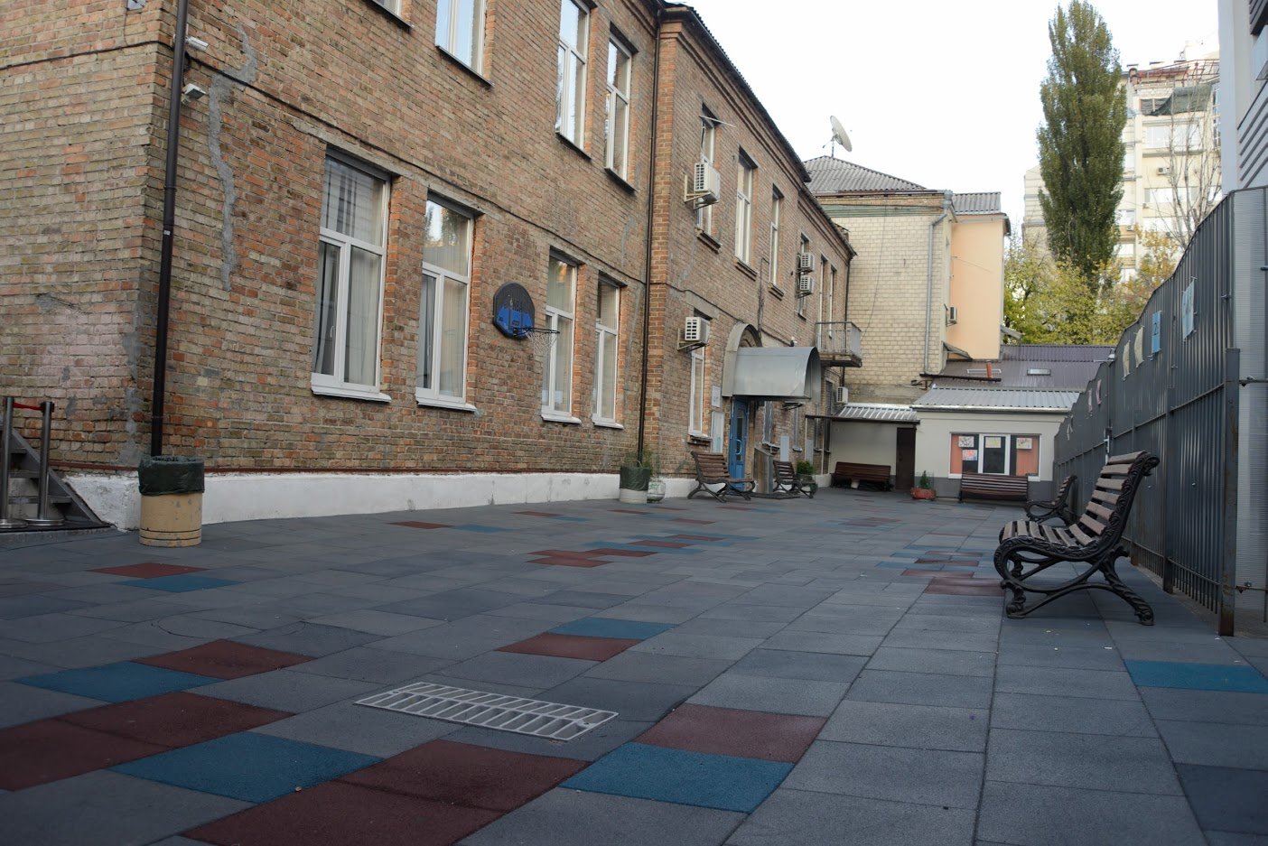 Lycée Français AEFE Anne de Kiev, 52B Bogdana Khmelnytskogo, Kyiv